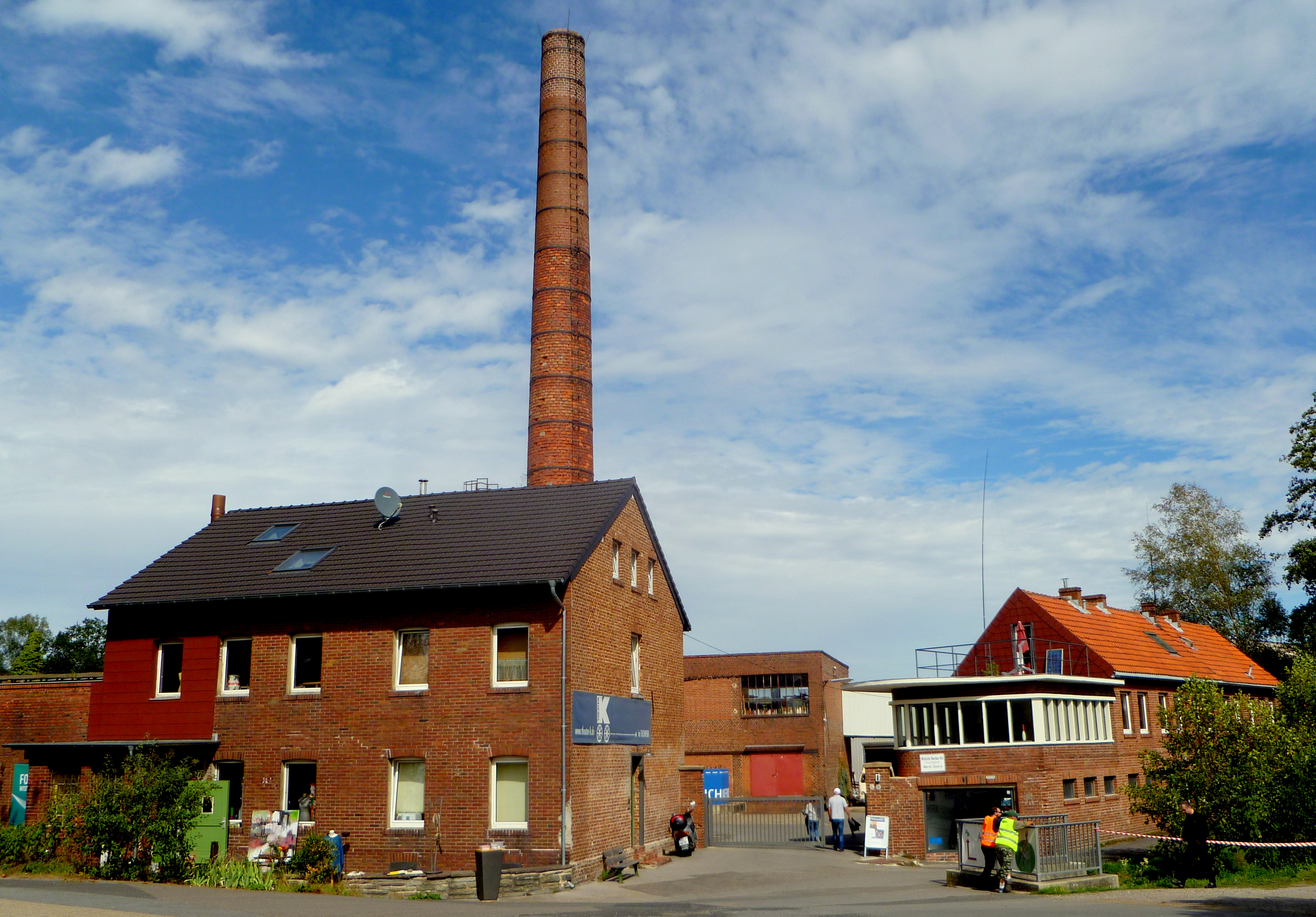 Stockheider Mühle; Strüver Weg 112-118 in Aachen-Laurensberg, Baudenkmal in Aachen-Laurensberg, Sitz des Tuchwerk Aachens, des Theate K und des Atelier Pasch